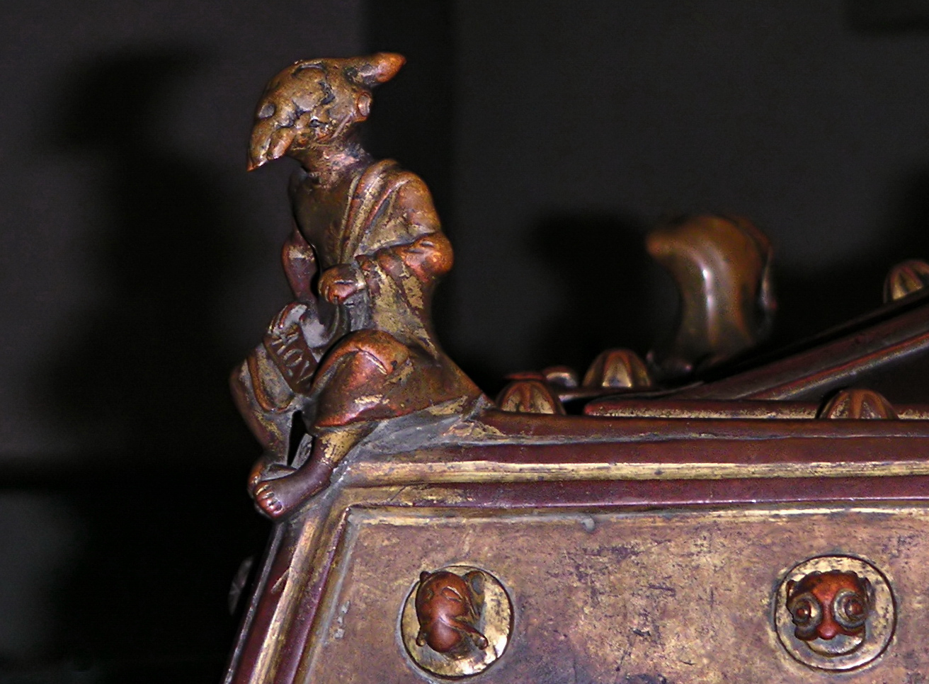 Satyr vom Fuß des Siebenarmigen Leuchters im Essener Münster